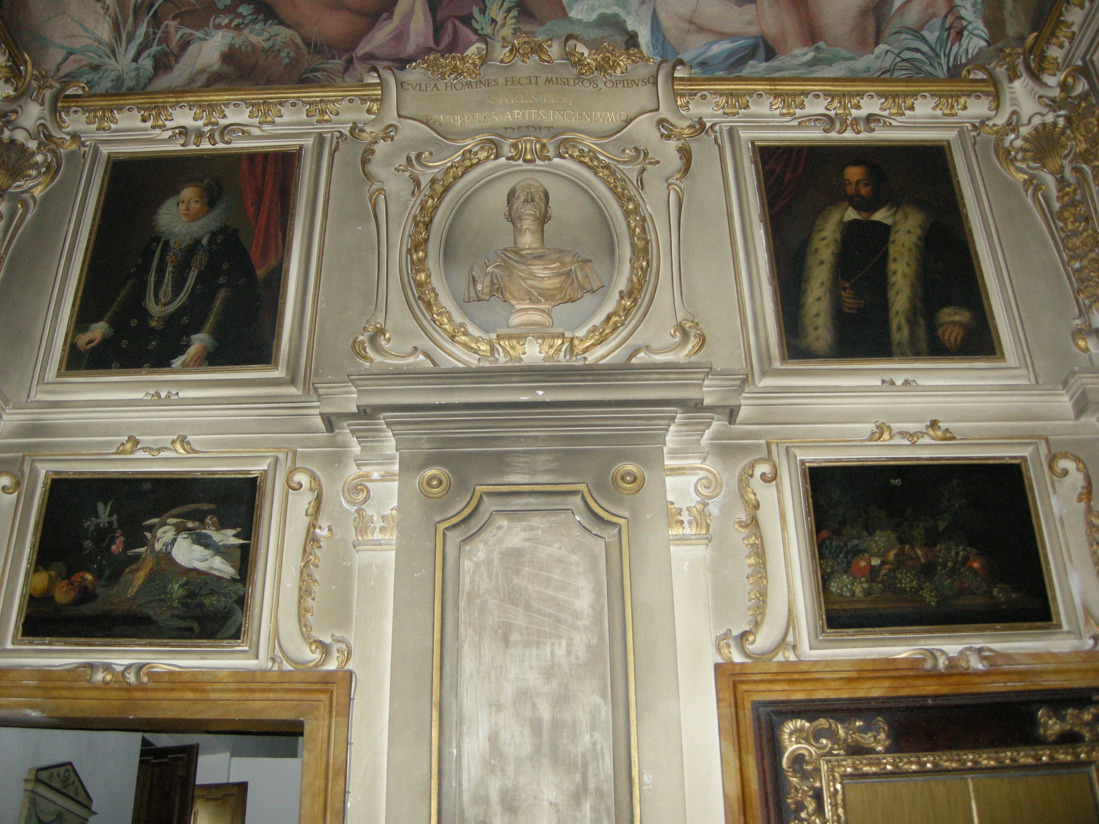 Palazzo giugni, galleria, lato